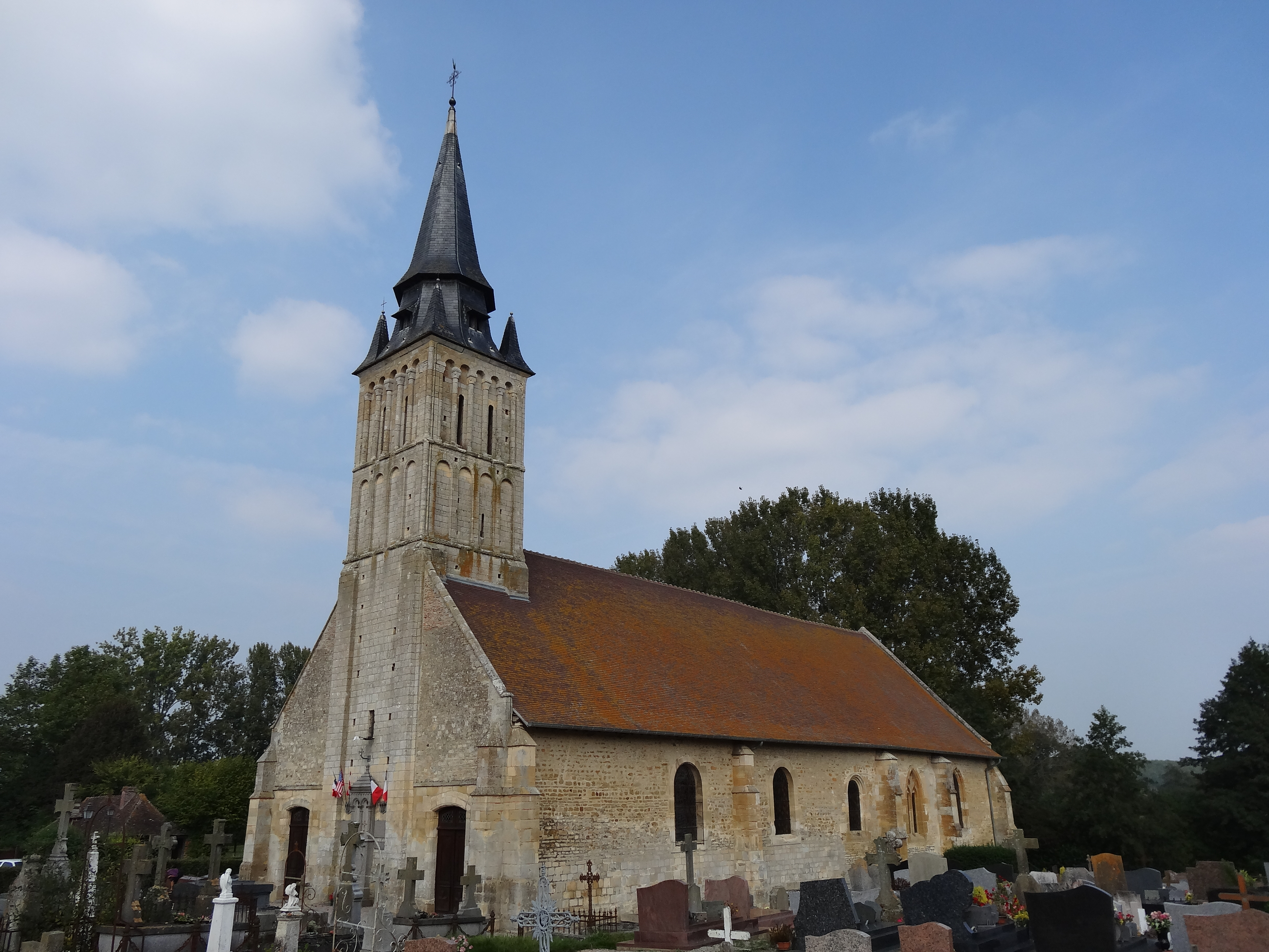 le Mesnil-Mauger, église St Etienne